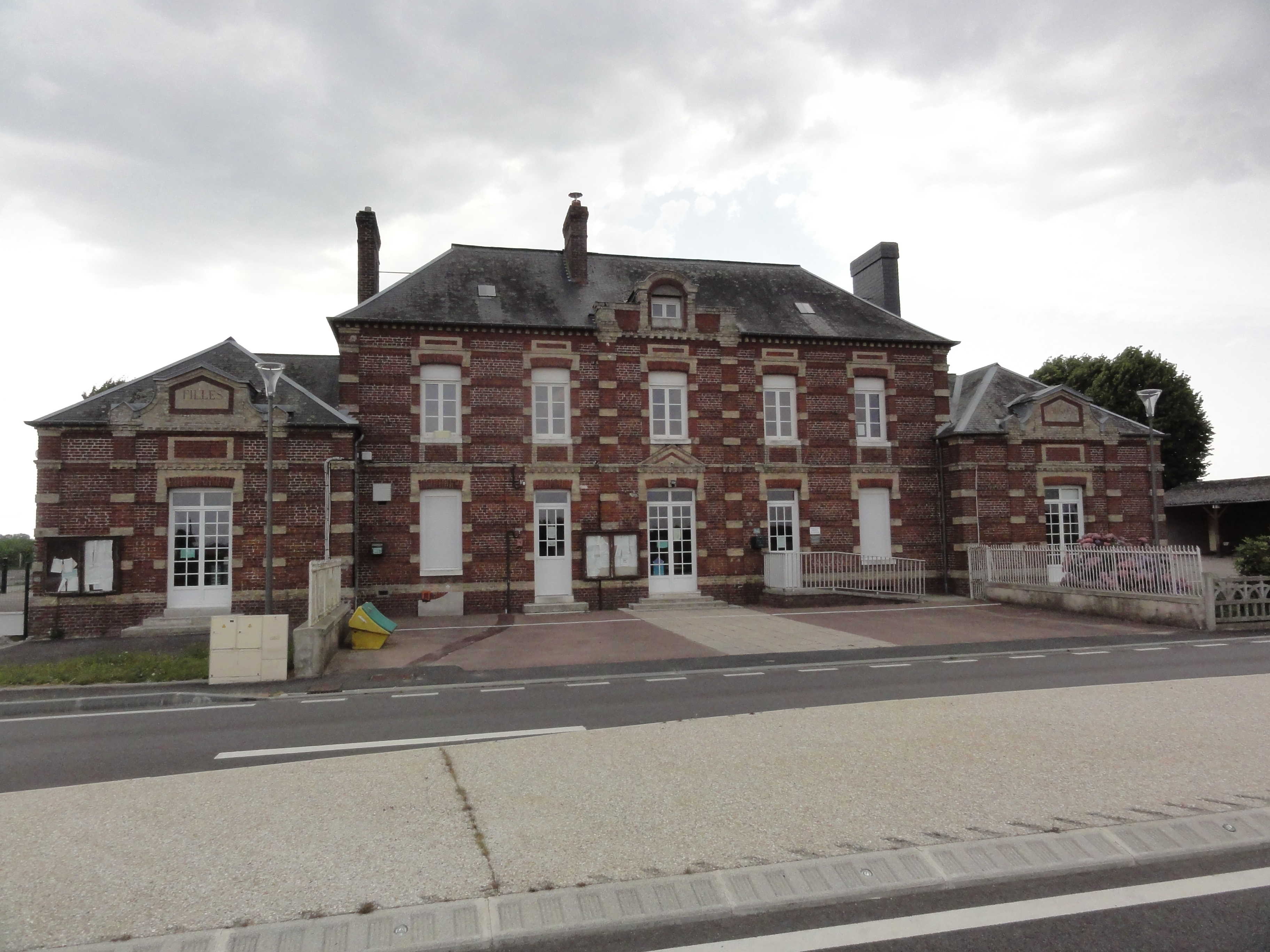 Trouville-Alliquerville (Seine-Mar.) école à mi-chemin des deux anciennes communes